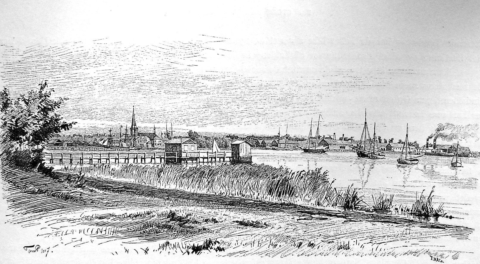 Nyborg Fjord